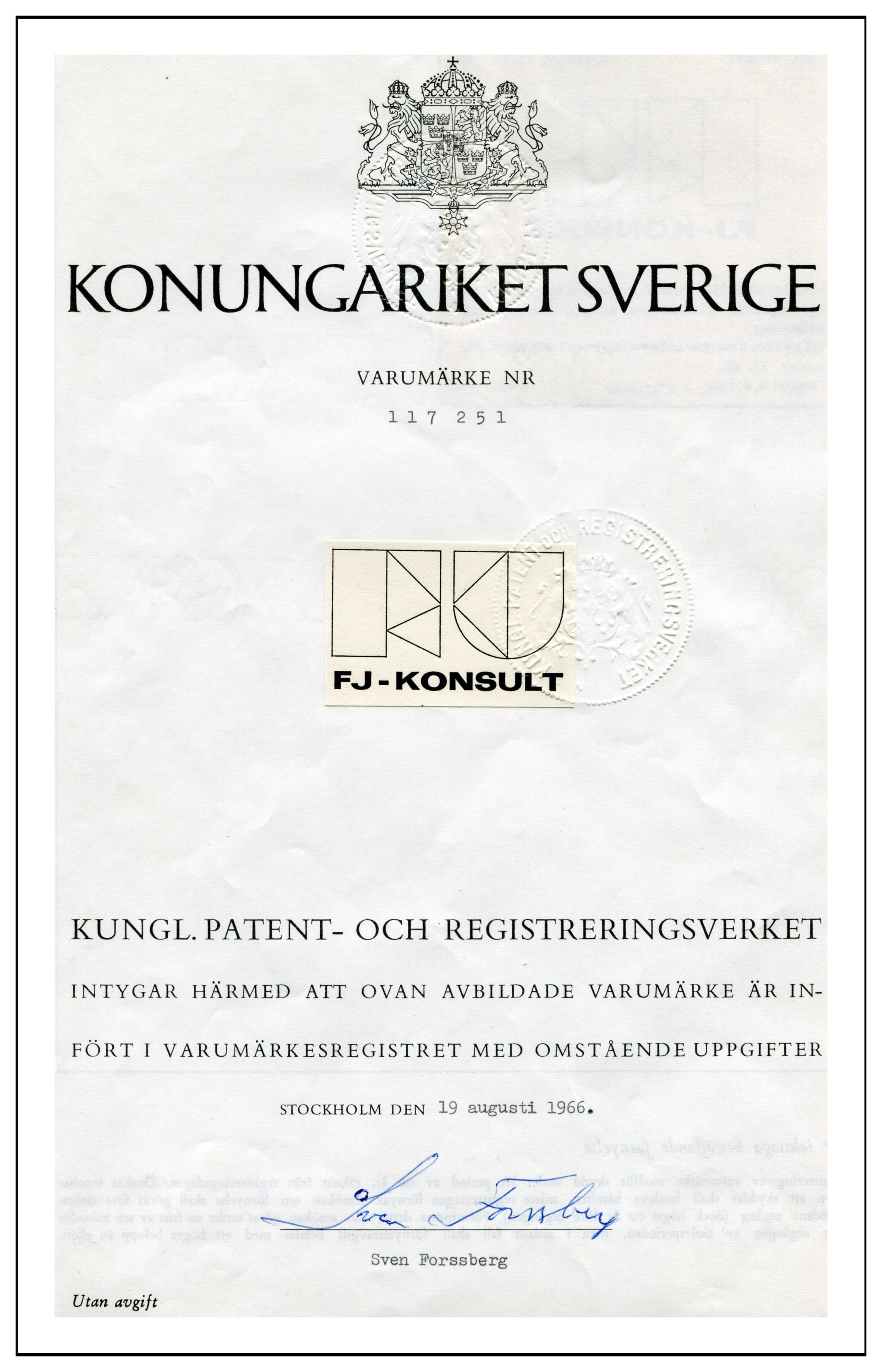 Varumärket registrering nr. 117 251 "FJ-KONSULT" av den 19 augusti 1966.